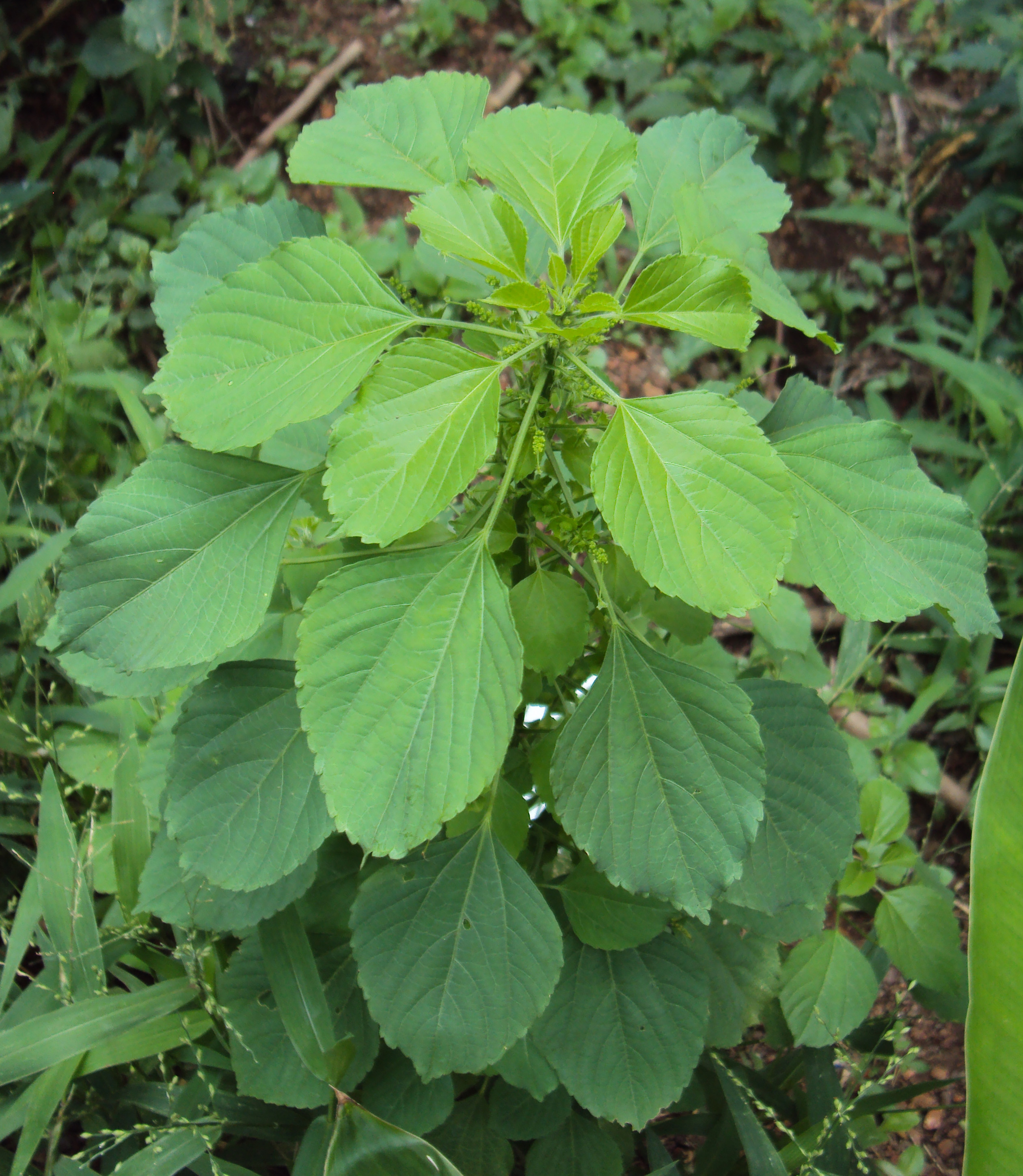 Acalypha indica കുപ്പമേനി